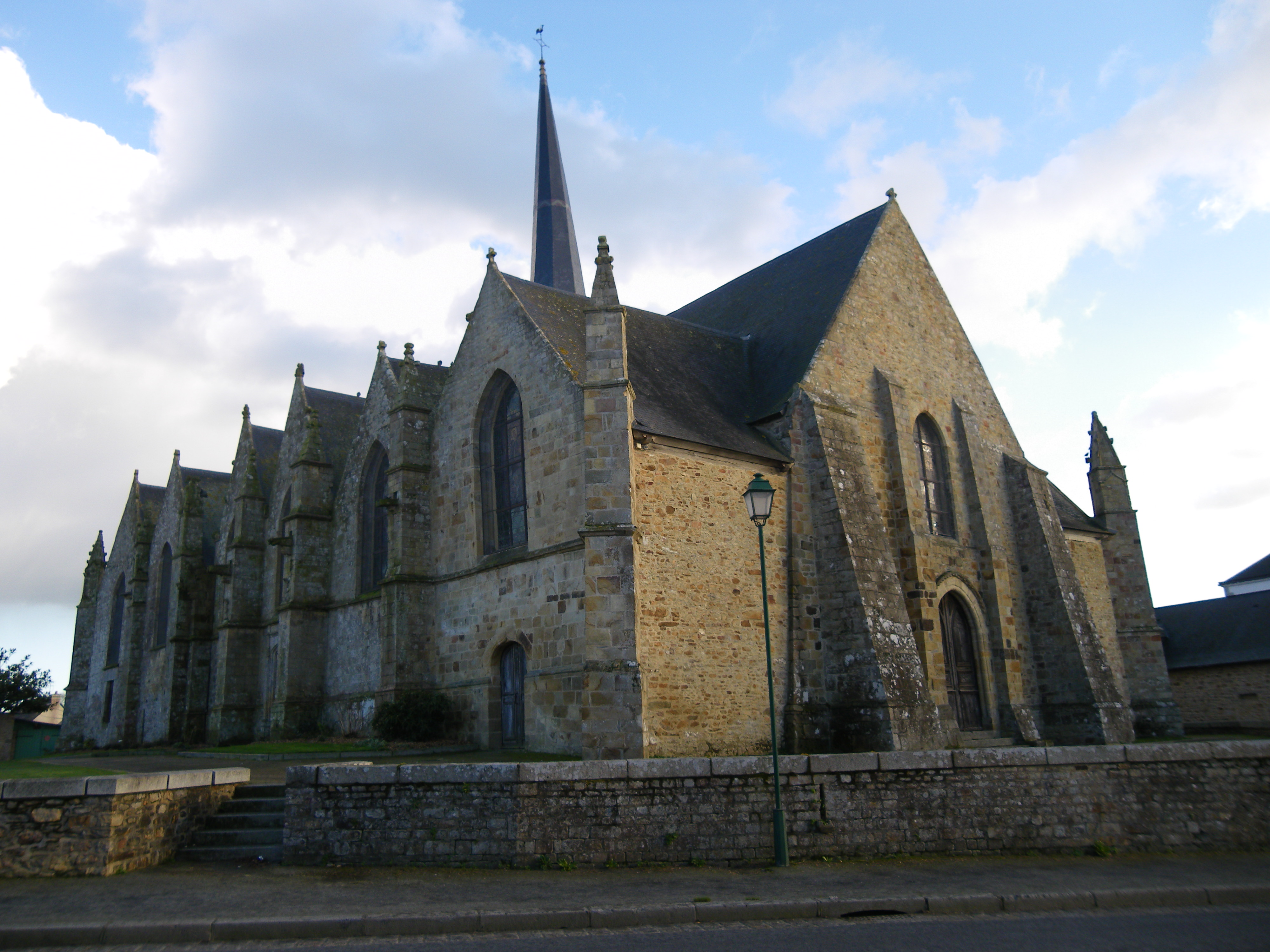 l'eglise de rannée